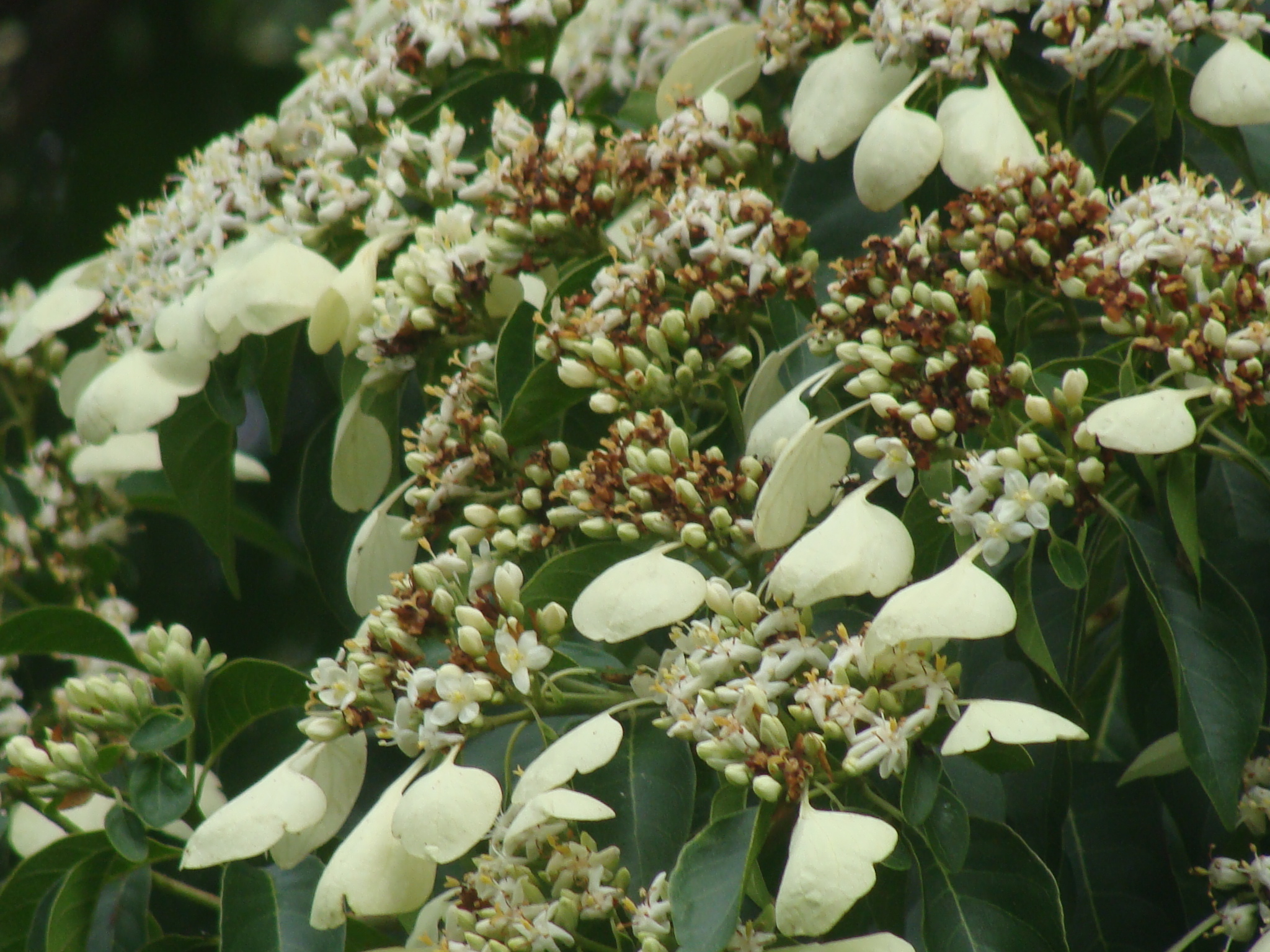 Planta de las selvas de Chiapas, se le llama regionalmente Canelo